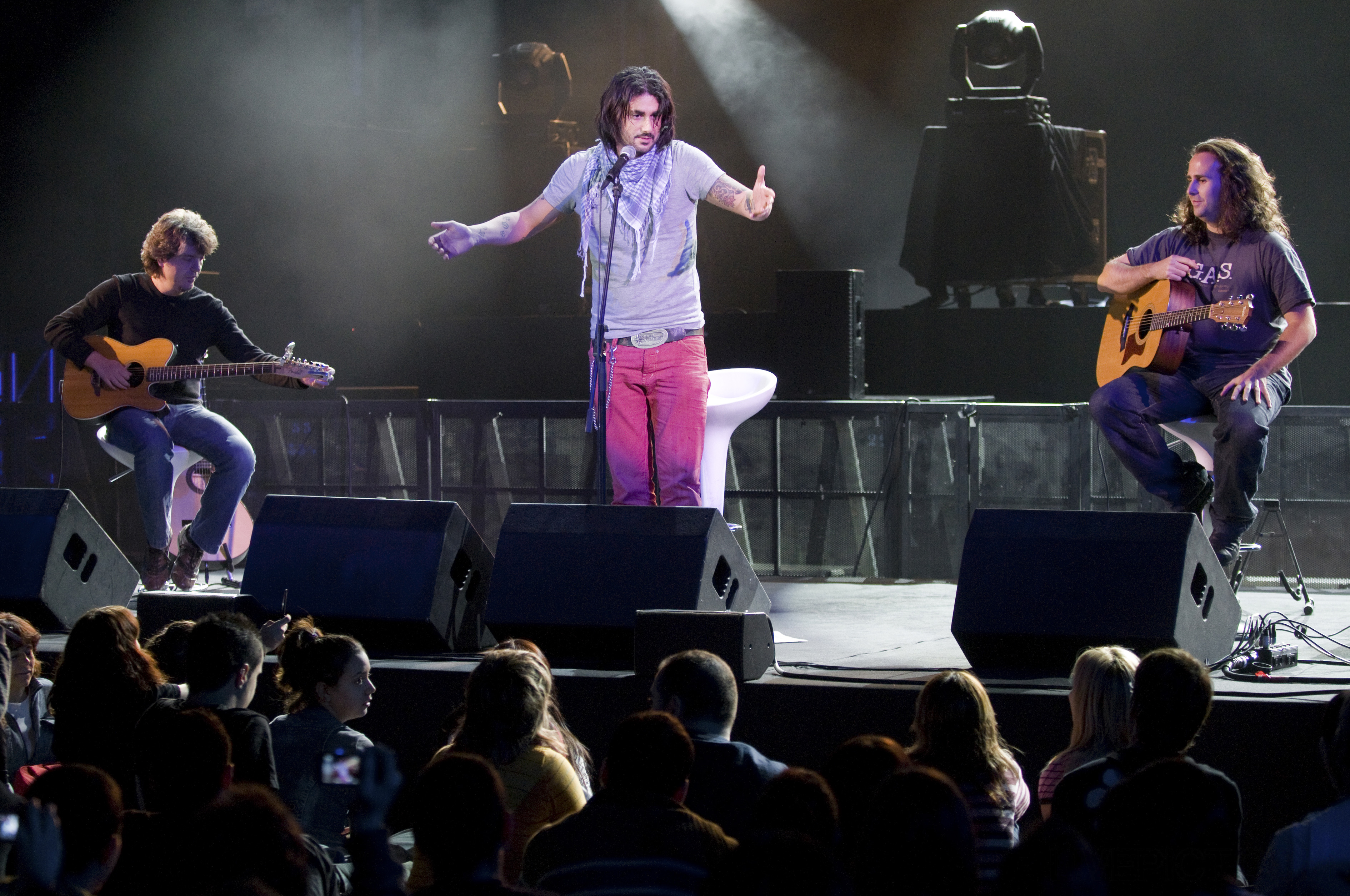 Melendi